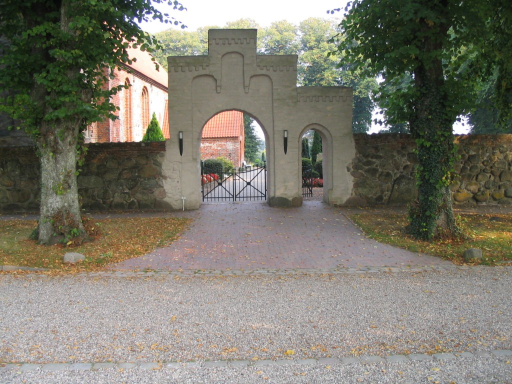 Östliches Portal der Grundhofer Friedhofsmauer, die gegen 1450 erbaut wurde.